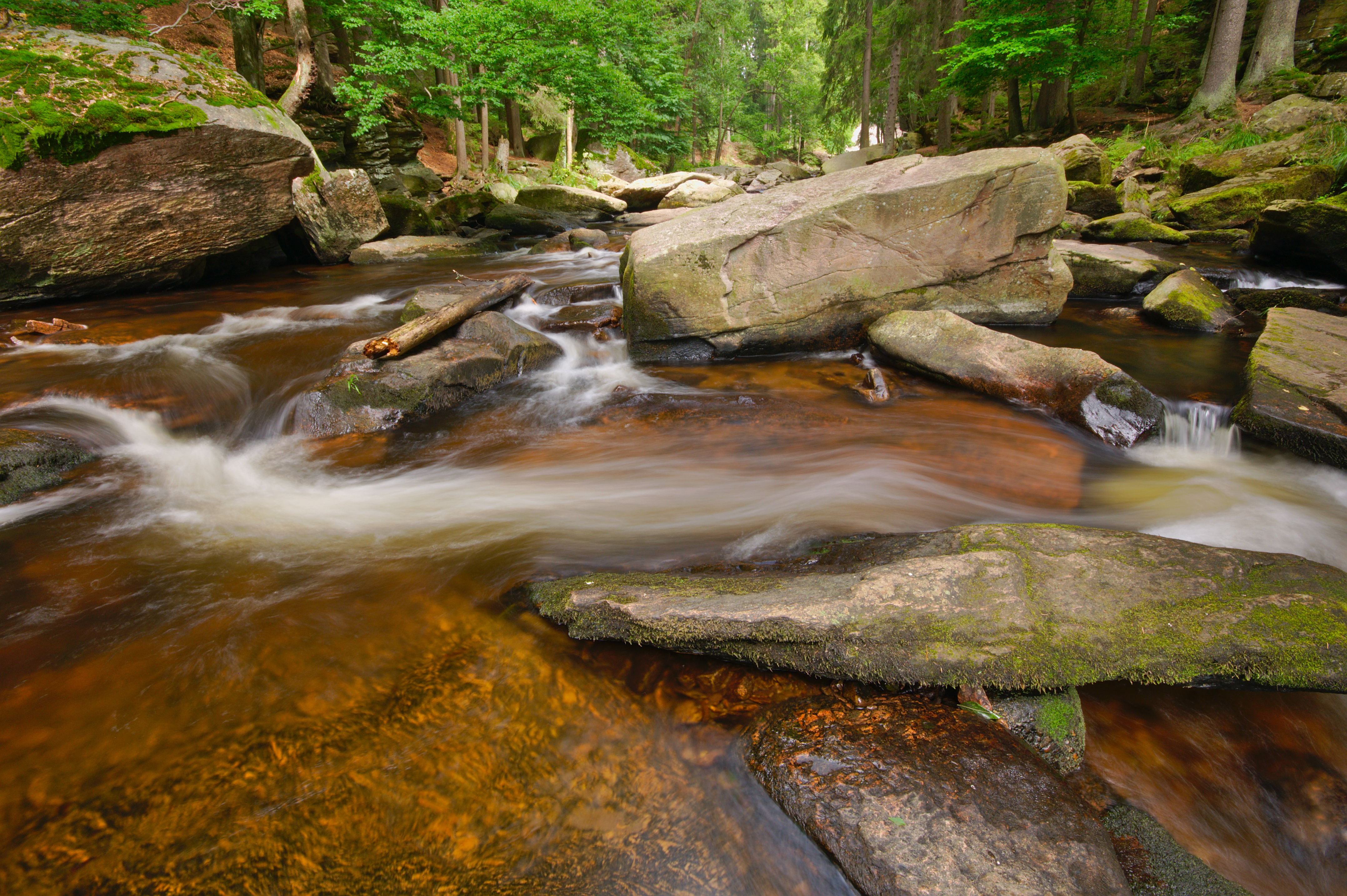 Přírodní rezervace Zemská brána, okres Ústí nad Orlicí